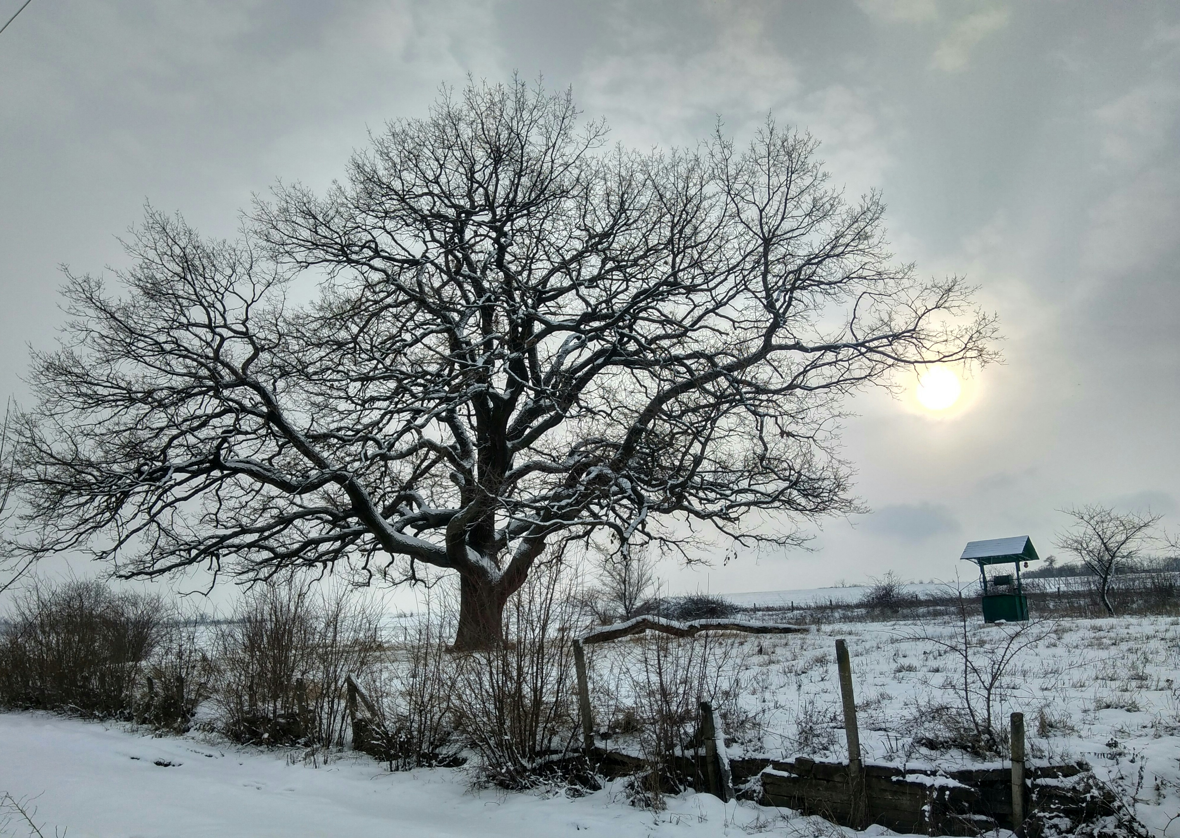 Stejar pedunculat, monument al naturii amplasat în mun. Chișinău, Schinoasa-2, str. Basarabiei (cod MD-C-mn.Cb-121) Cb-121